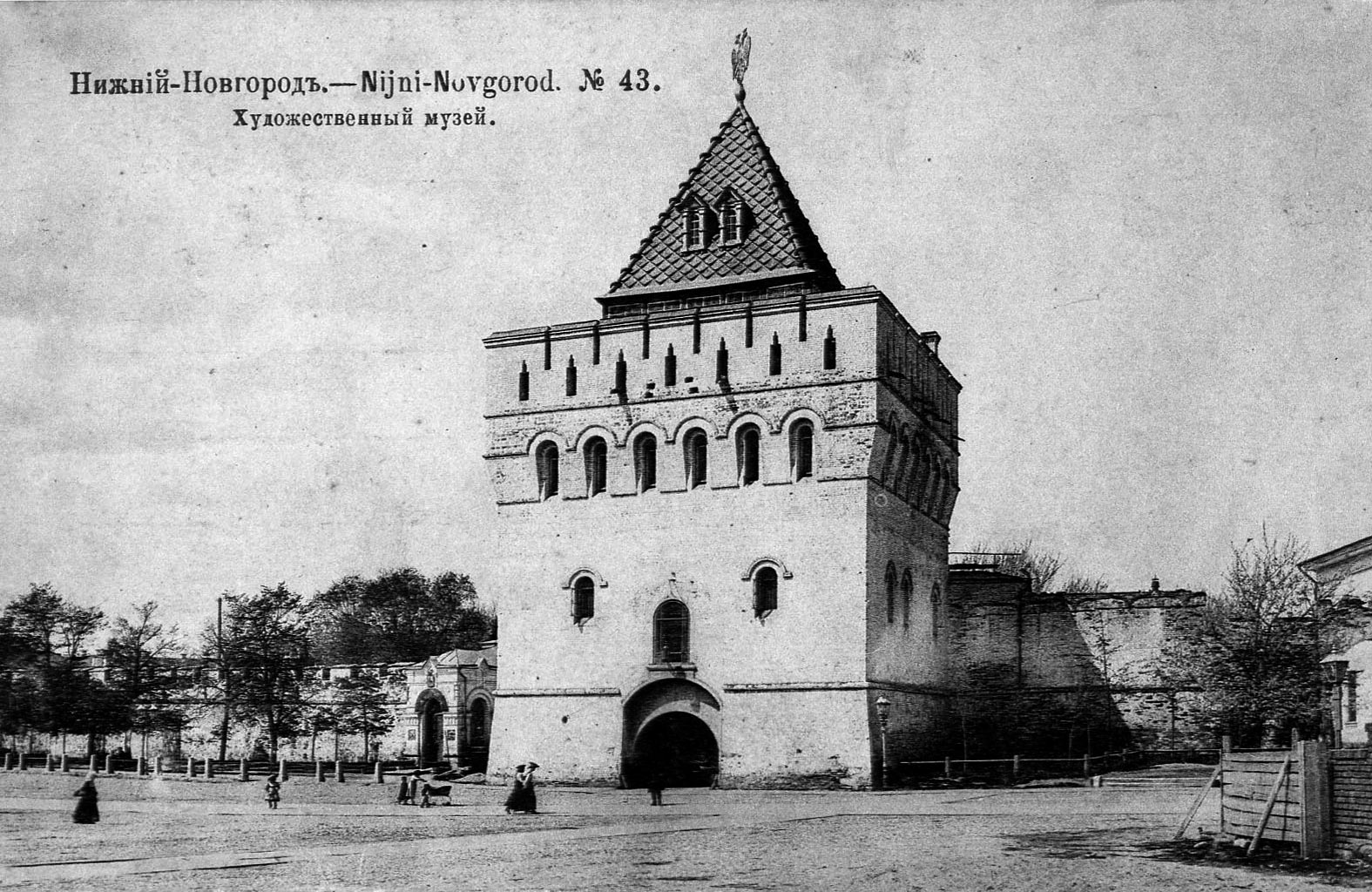 Дмитровская башня Нижегородского Кремля, в помещении которой с 1896 по 1919 гг. располагался Художественный музей